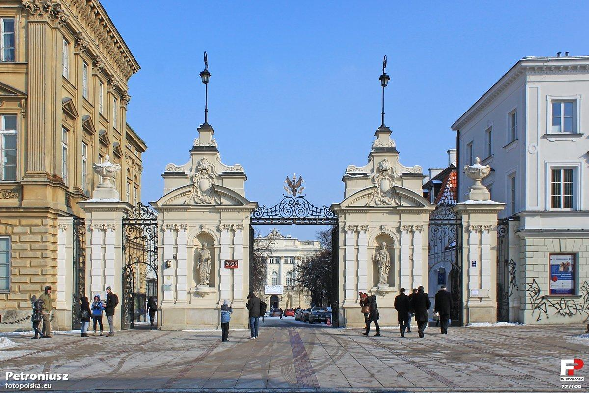 Główna brama prowadząca na teren Uniwersytetu Warszawskiego.